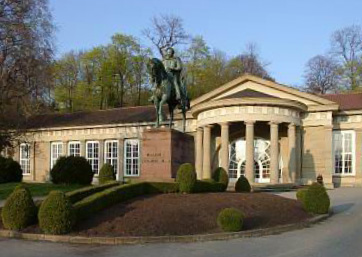 Großer Kursaal Stuttgart-Bad Cannstatt 2004